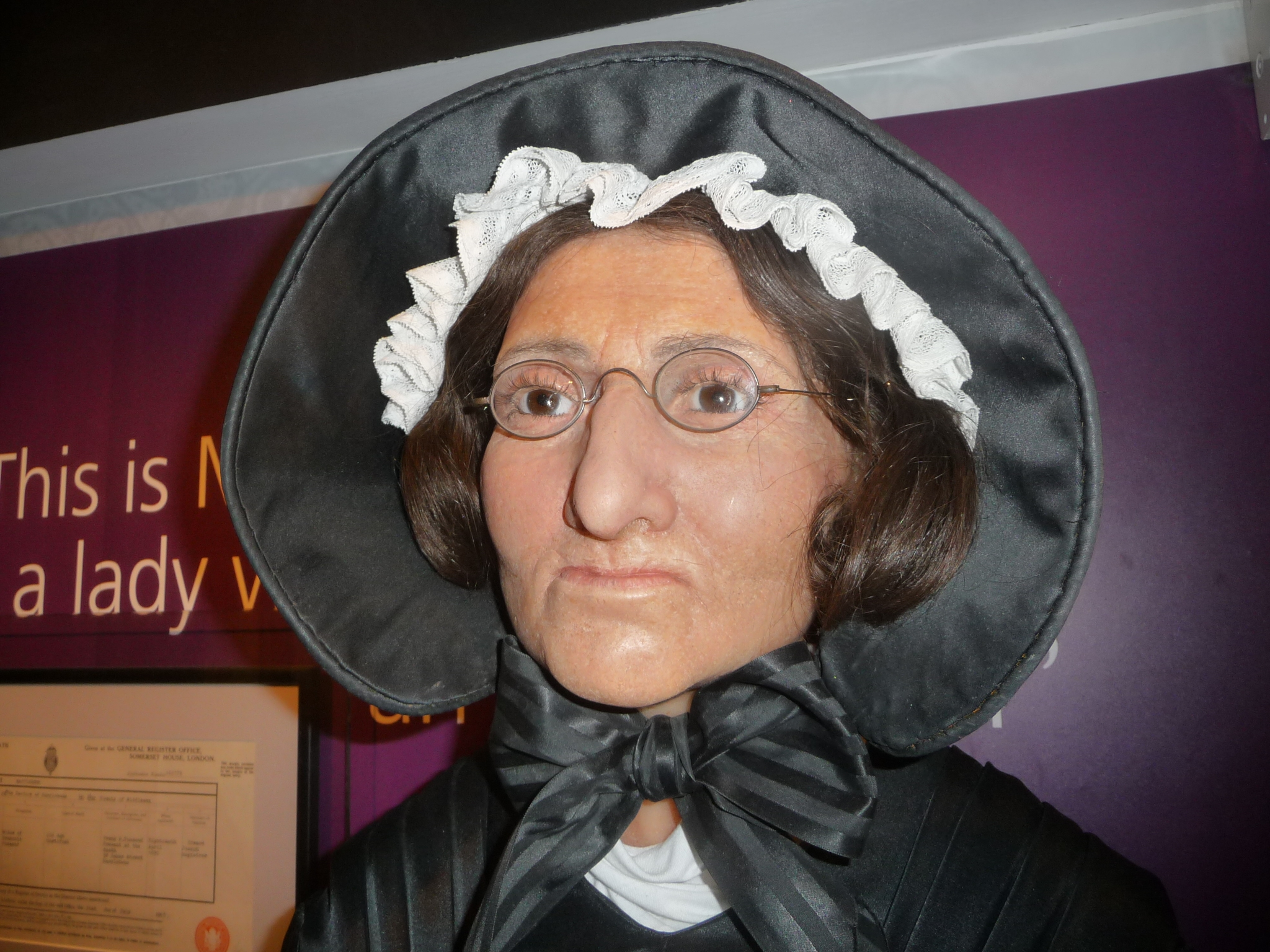 Madame Tussauds London